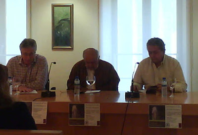 Presentación do libro "Senderos para el viajero" de Pablo Mosquera en Ribadeo